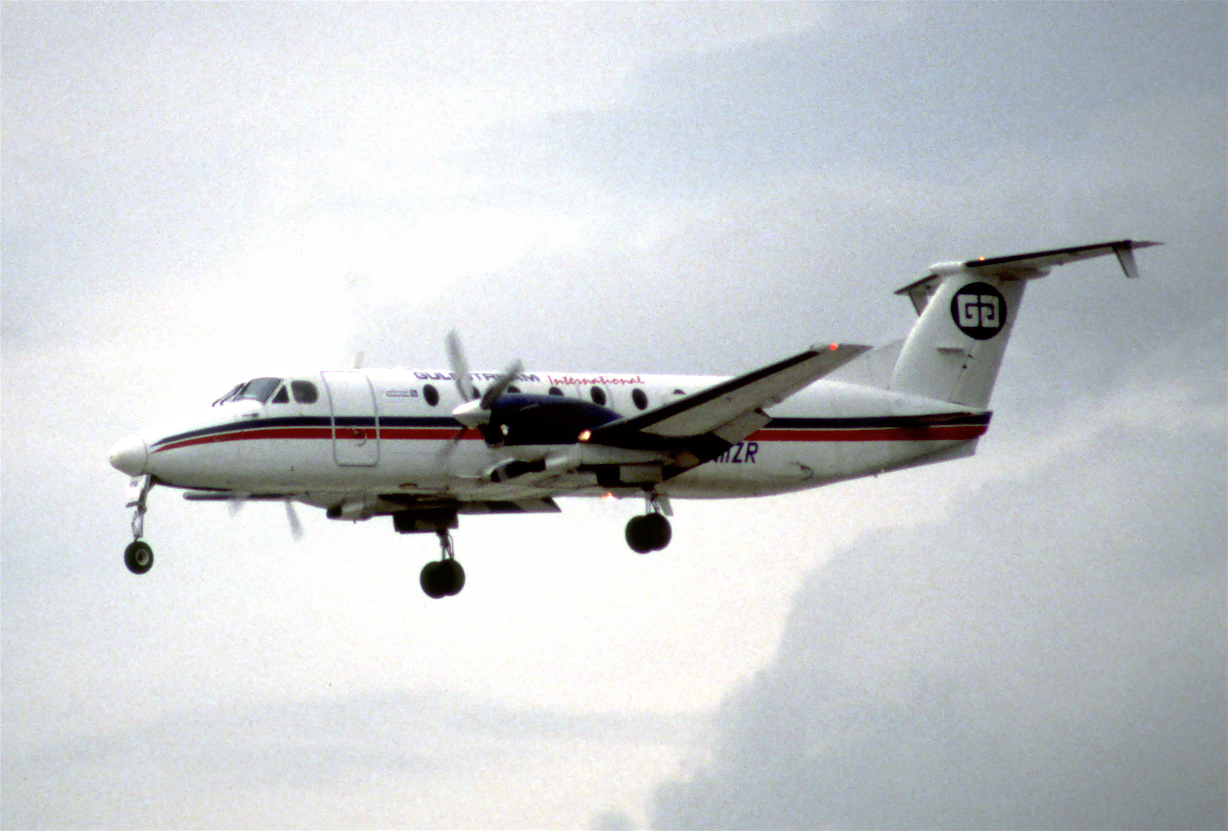 8en - Gulfstream International Airlines Beech 1900C Airliner; N11ZR@MIA;24.01.1998